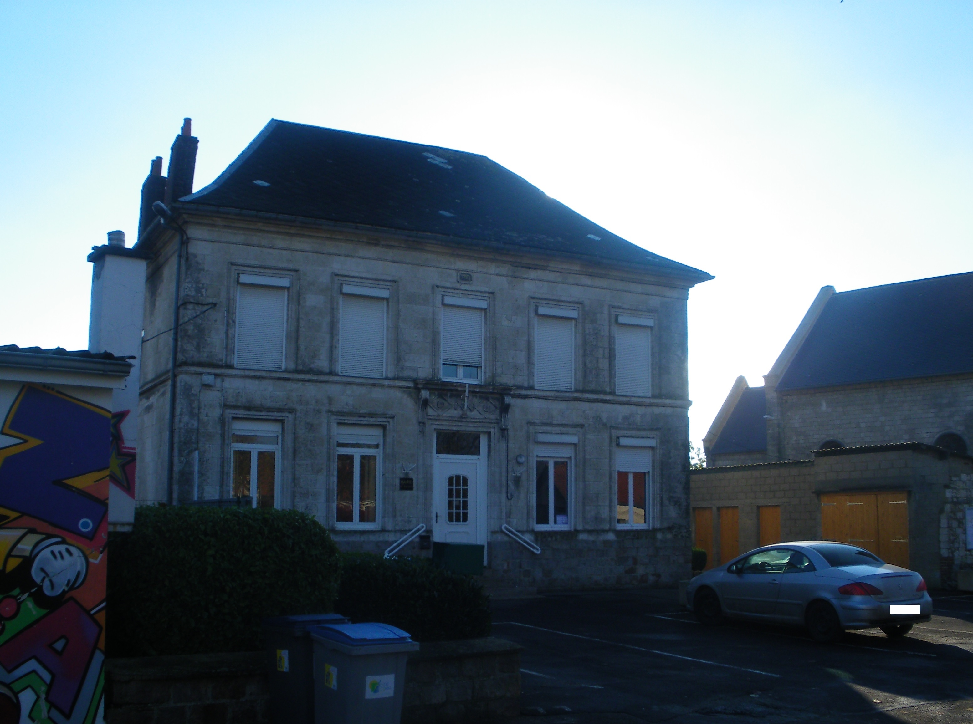 Vue de la mairie d'Estrée-Cauchy.